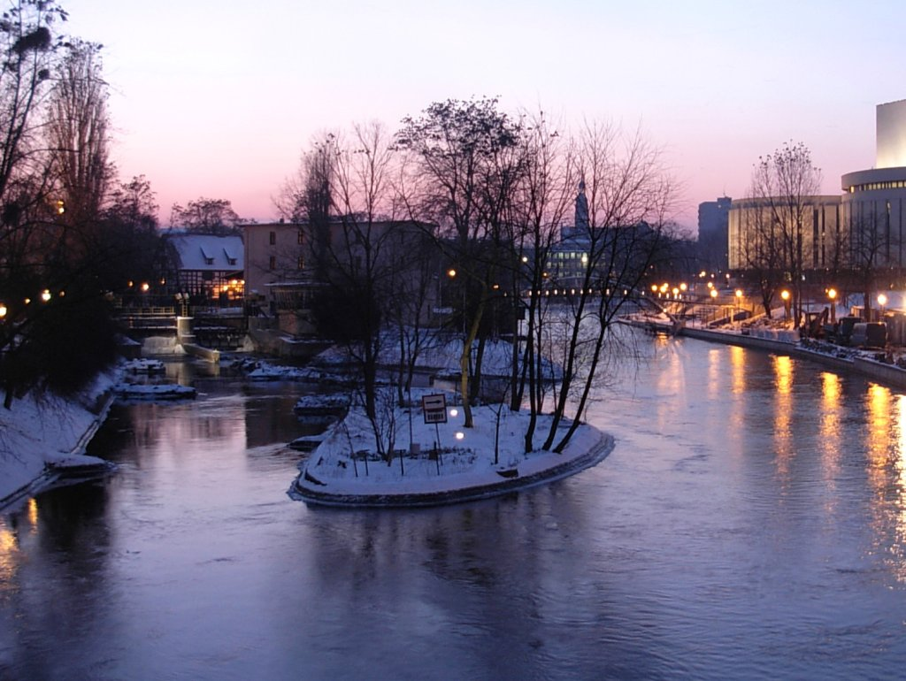 Wyspa św. Barbary w Bydgoszczy